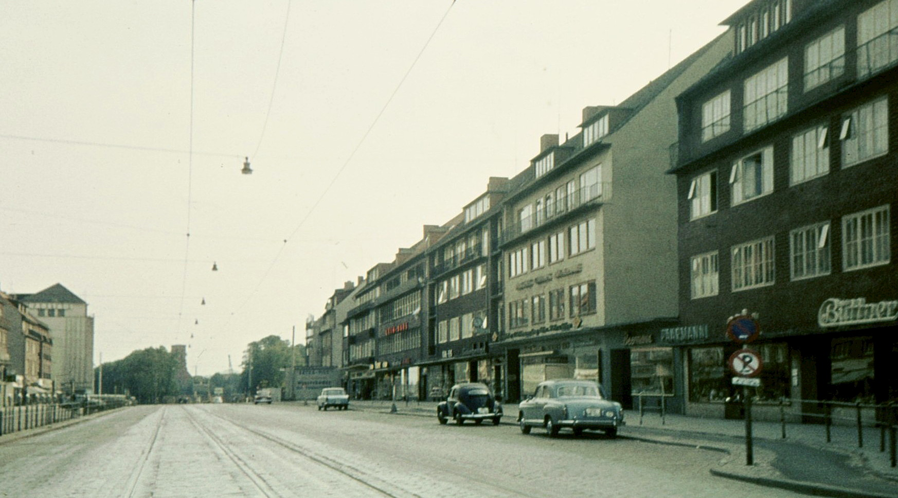 Wandsbeker Marktstr. in Hamburg